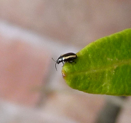 Turnip Flea. Phyllotreta nemorum